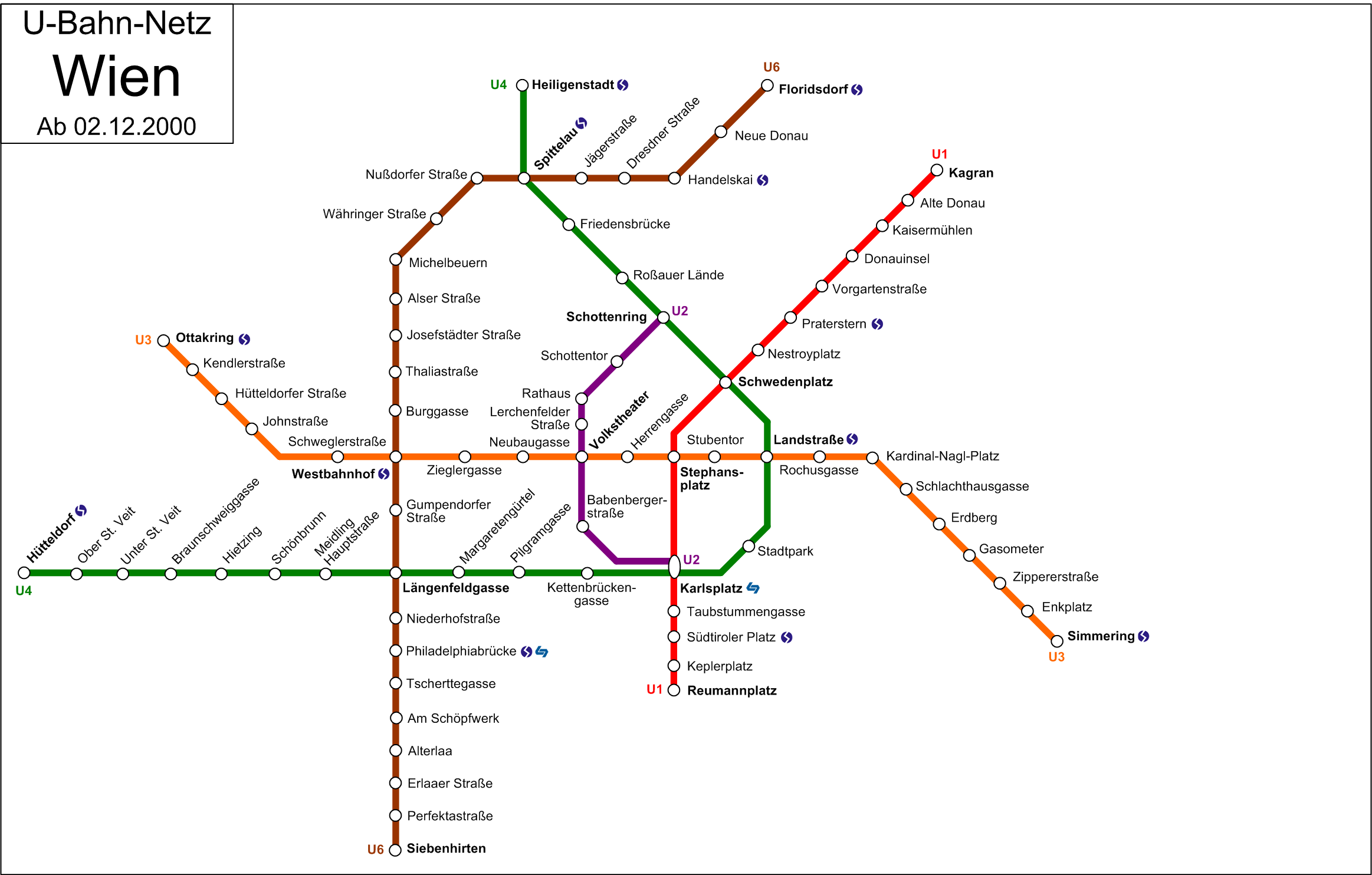 Netzplan Wiener U-Bahn 2000